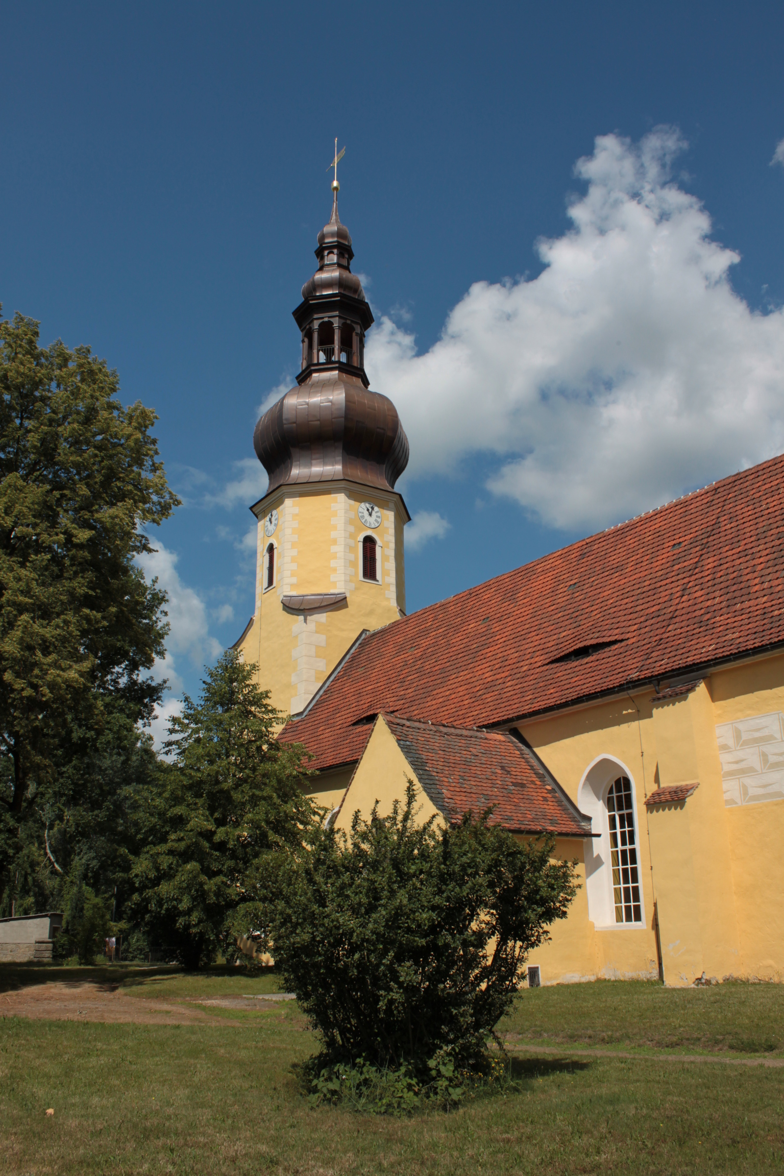 Evangelische Kirche in Neschwitz, Landkreis Bautzen. Hornjoserbsce: Njeswačanska ewangelska cyrkej.